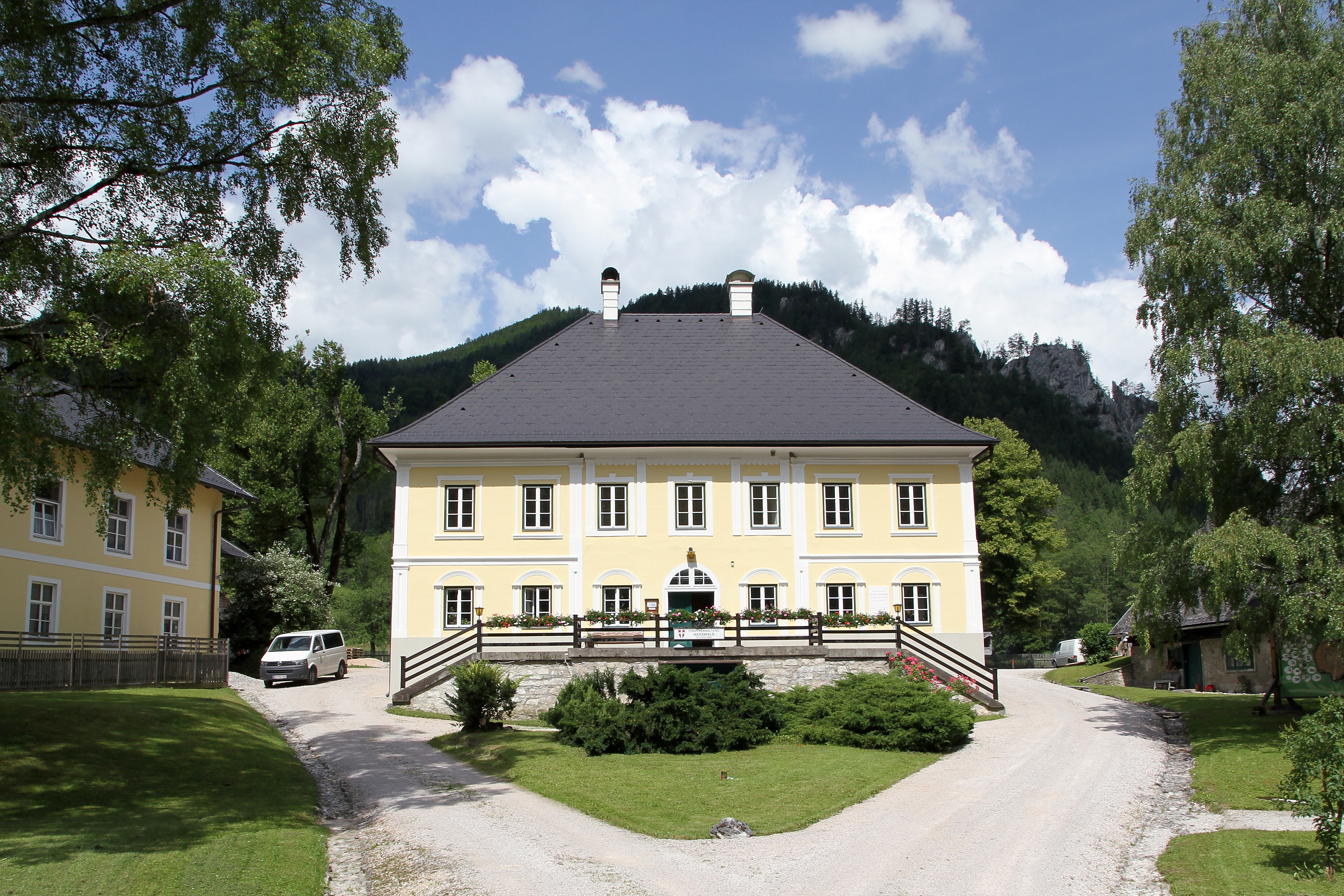 Ehemaliger Reithof und jetzige "Forstverwaltung Nasswald" der Gemeinde Wien in Naßwald, eine Rotte in der niederösterreichischen Marktgemeinde Schwarzau im Gebirge.